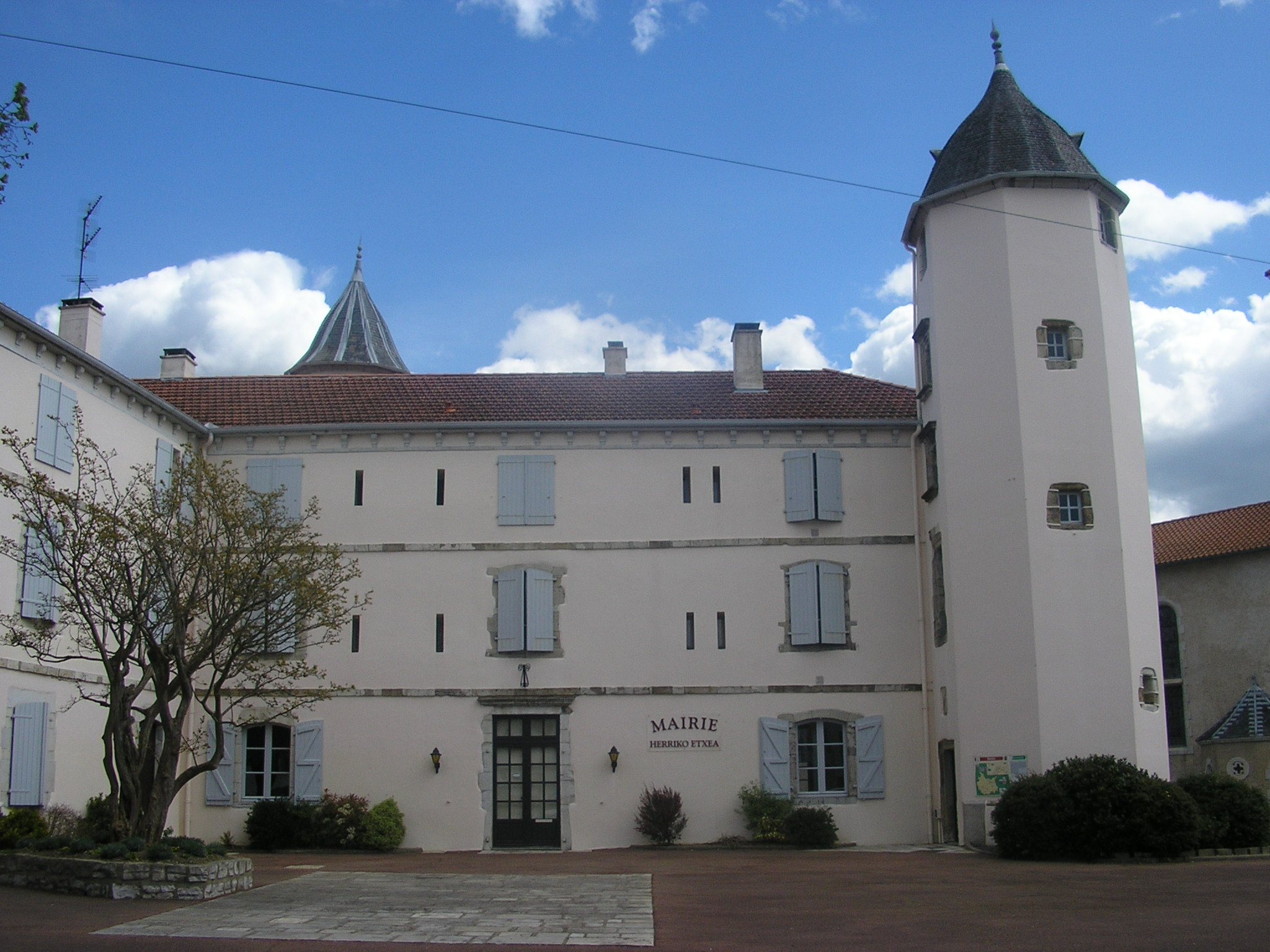 Façade Nord du Château de 'Salha' situé au bourd de Bardos.